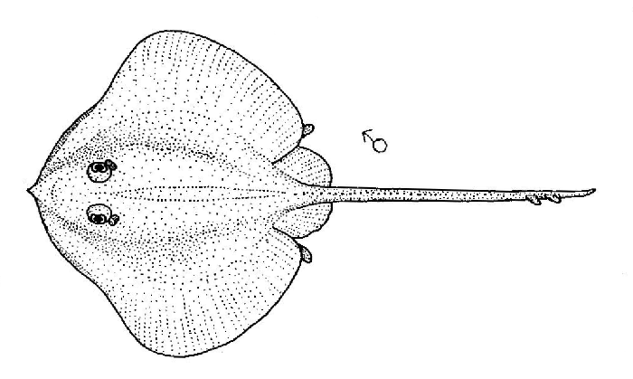 Notoraja asperula (Prickly deepsea skate)